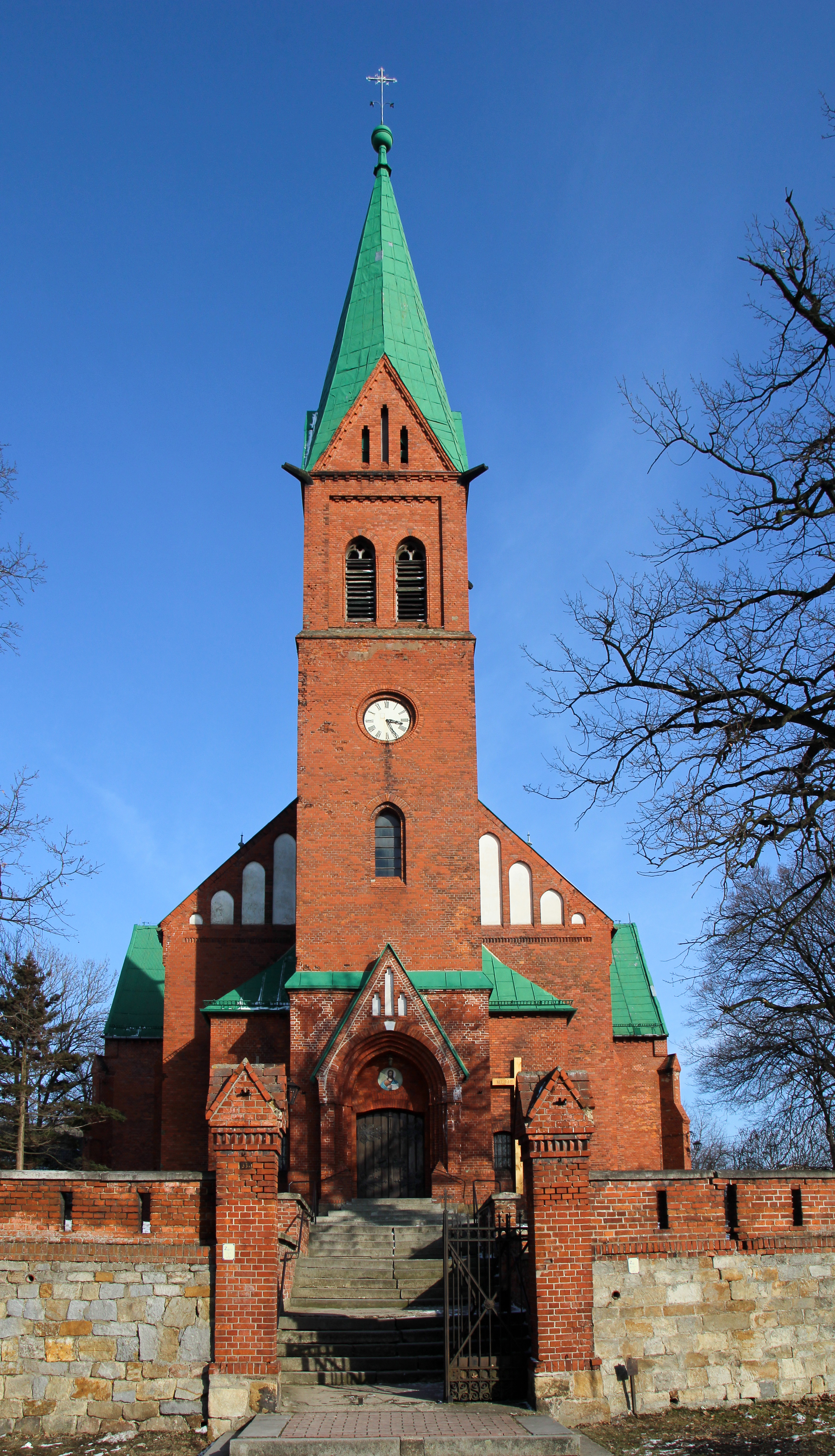 Koperniki – wieś w Polsce, w województwie opolskim, w powiecie nyskim, w gminie Nysa.